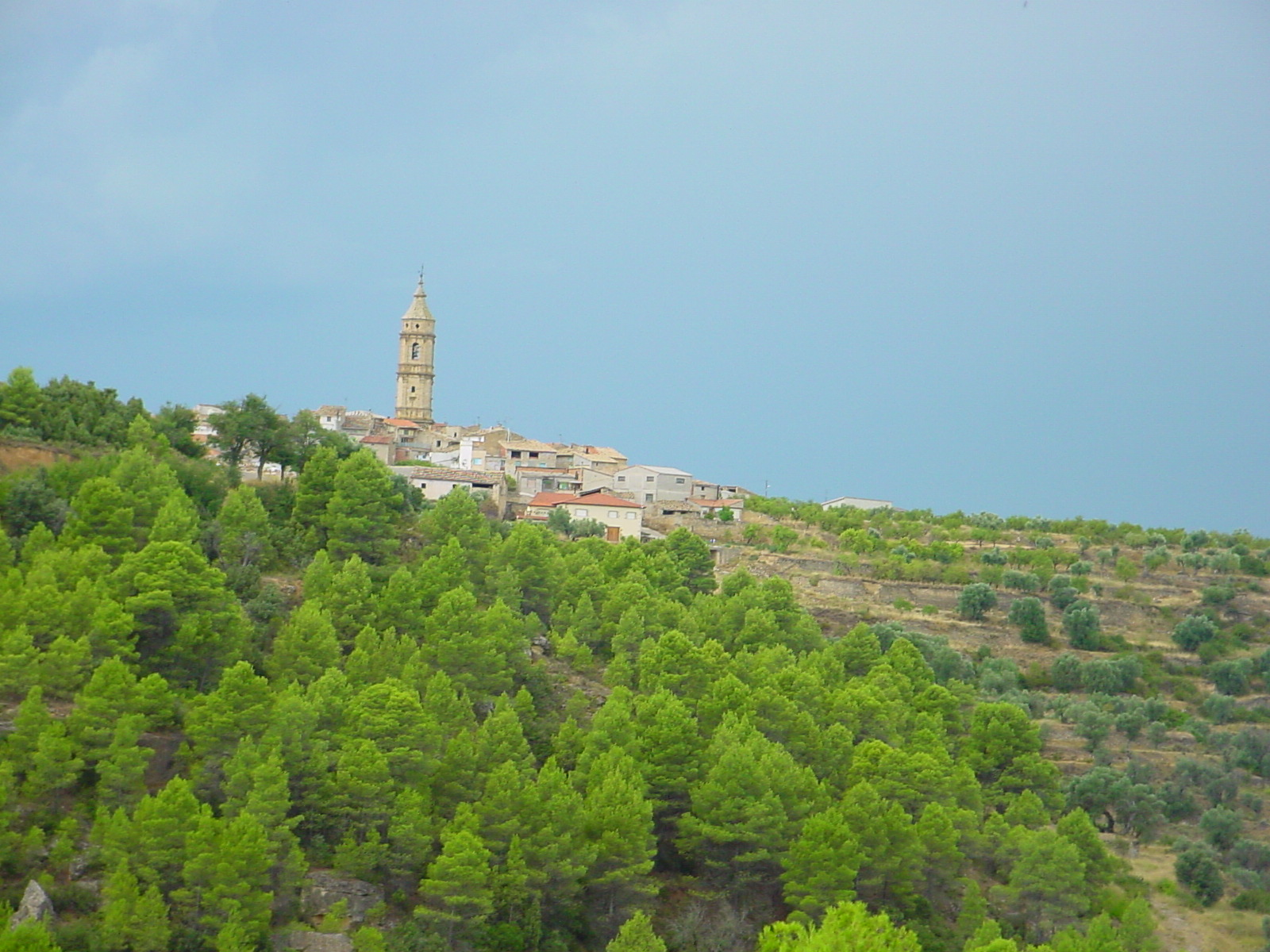 Village